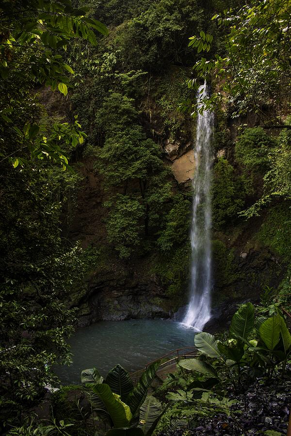 centro natural de recreación familiar